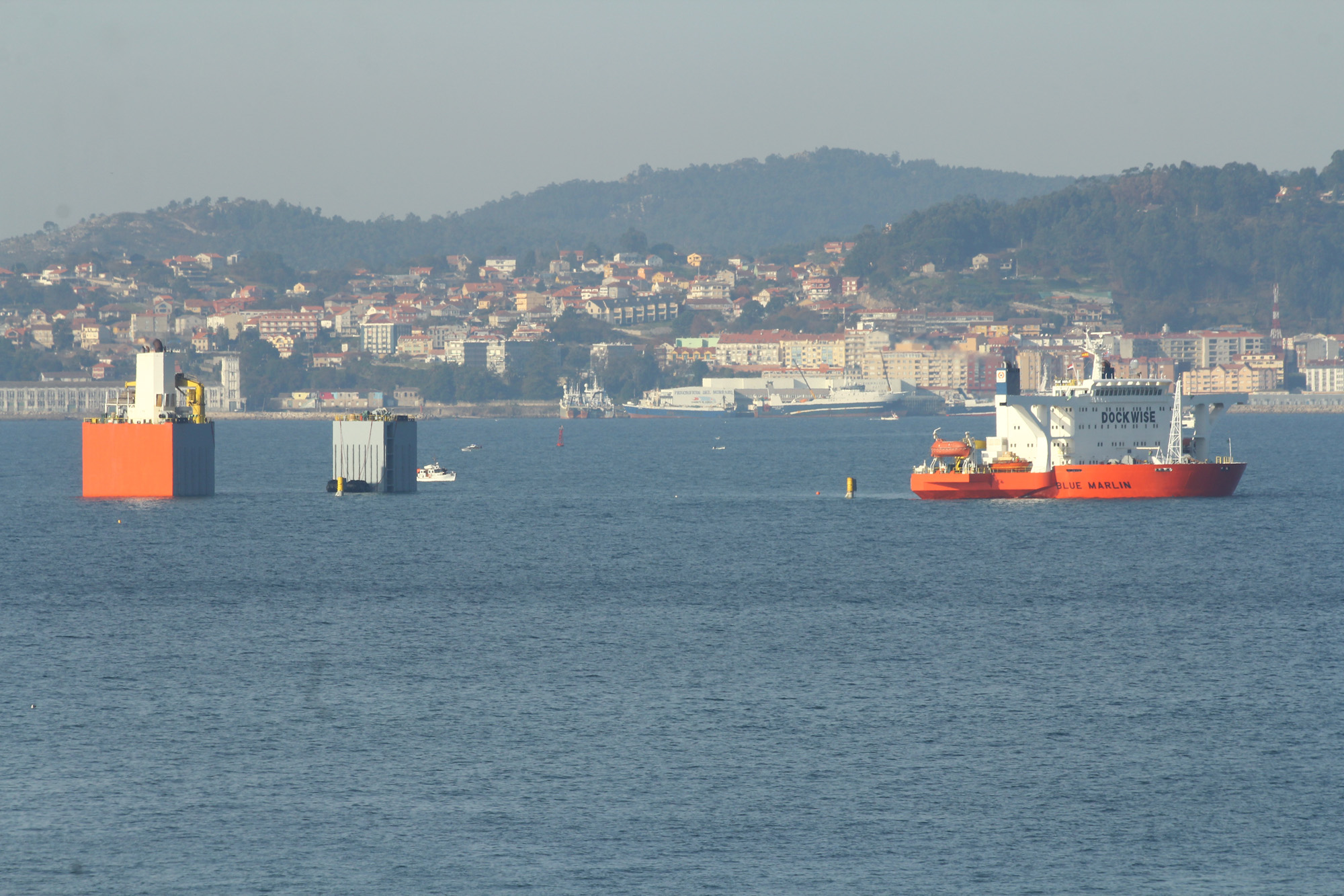 Embarque del portaaviones HMAS Adelaide de la Real Armada Australiana en la plataforma semisumergible Blue Marlin. El portaaviones fue construido por los astilleros de Navantia en Ferrol y la operación de embarque se lleva a cabo en la Ría de Vigo. Una vez cargado, el portaaviones será trasladado a Australia para completar su construcción. Vigo: Boarding of the aircraft carrier HMAS Adelaide at Blue Marlin platform Boarding of the aircraft carrier HMAS Adelaide of the Royal Australian Navy in the Blue Marlin semi-submersible platform. The aircraft carrier was built by Navantia shipyard in Ferrol and boarding operation is carried out in the Vigo Estuary. Once loaded, the aircraft carrier will be moved to Australia to complete its construction.